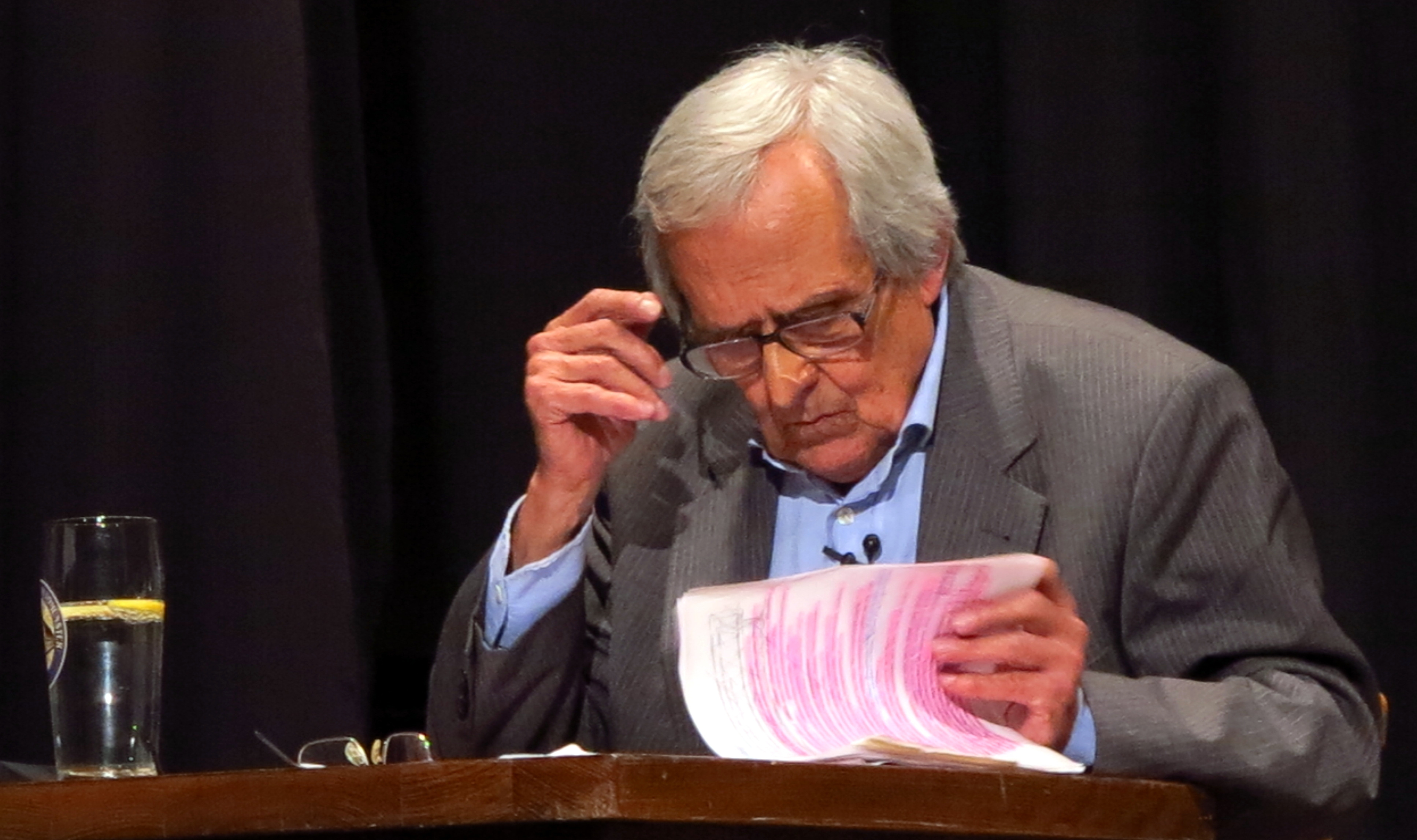 Der Kabarettist Dieter Hildebrand bei seinem letzten gemeinsamen Progamm mit dem Musikkabarettisten Hans Well im Kapplersaal in Altmünster bei Dachau